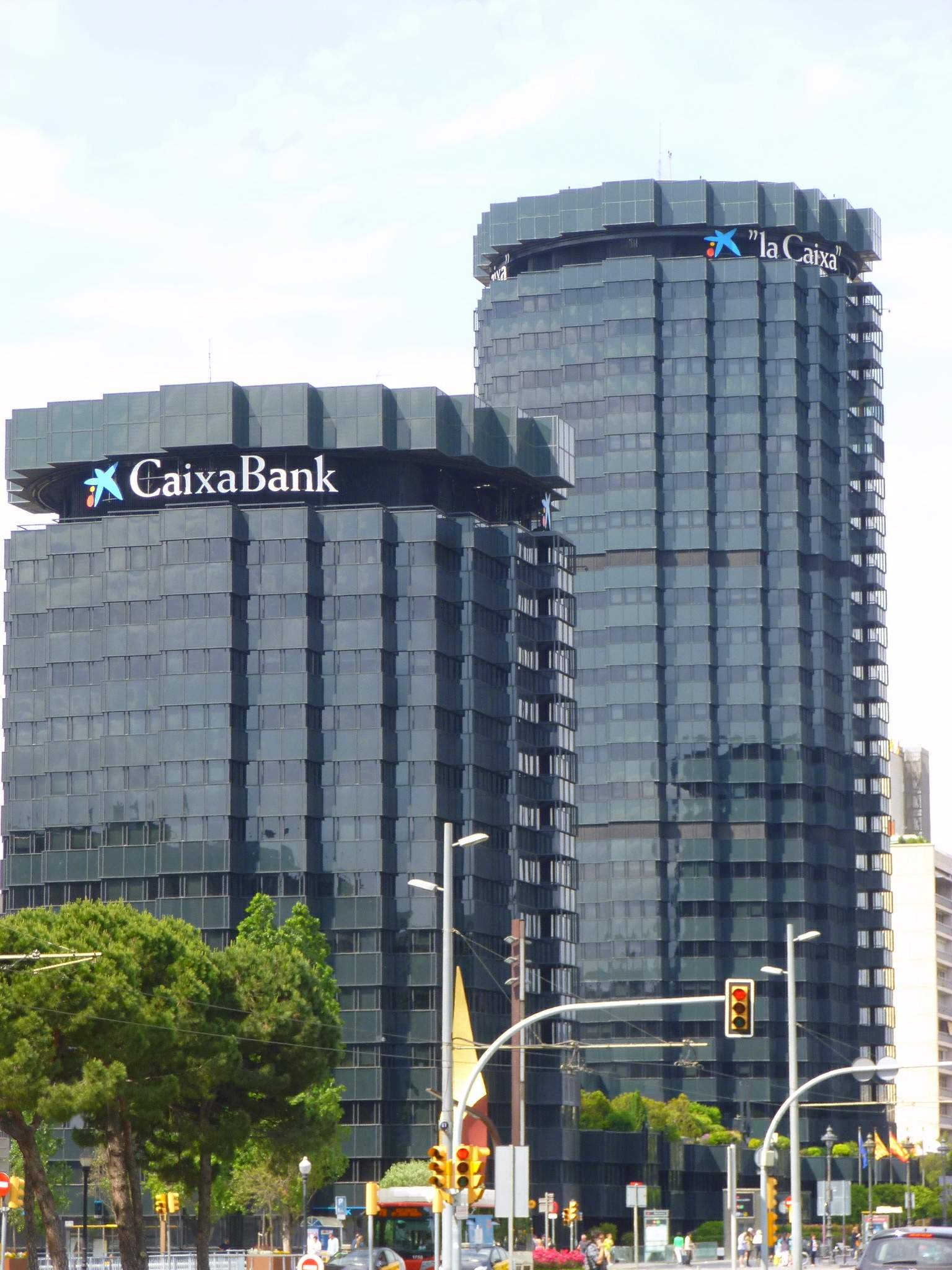 Barcelona - Torres La Caixa